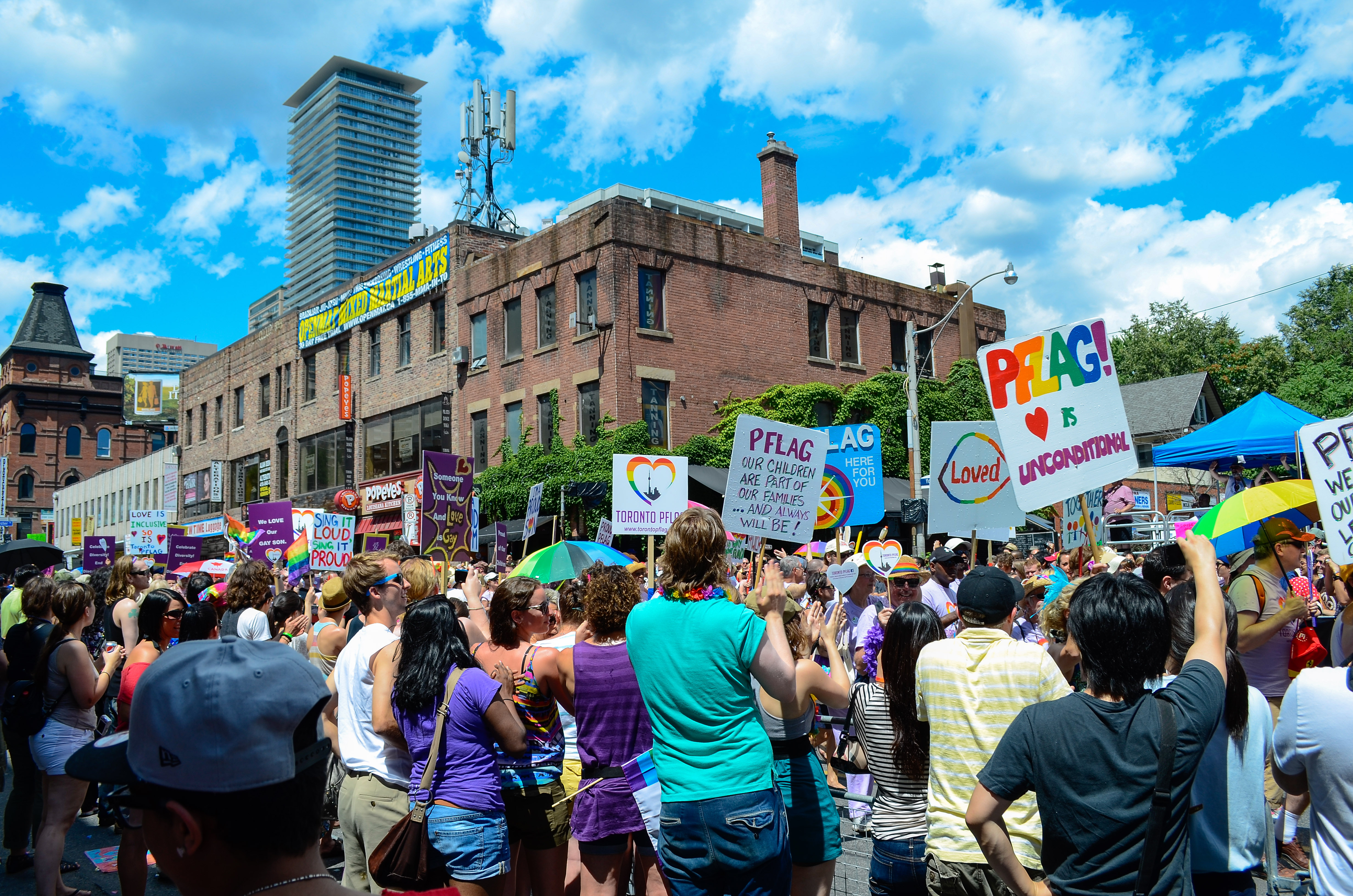 _DSC3525